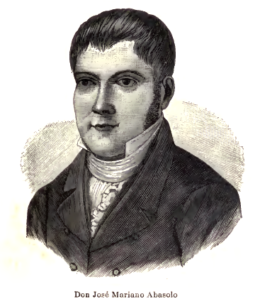 Imagen de José Mariano Abasolo extraida de Vicente Riva Palacio, Julio Zárate (1880) "México a través de los siglos" Tomo III: "La guerra de independencia" (1808 - 1821).